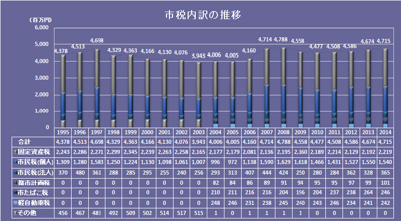 見附市の市税内訳の推移グラフです。